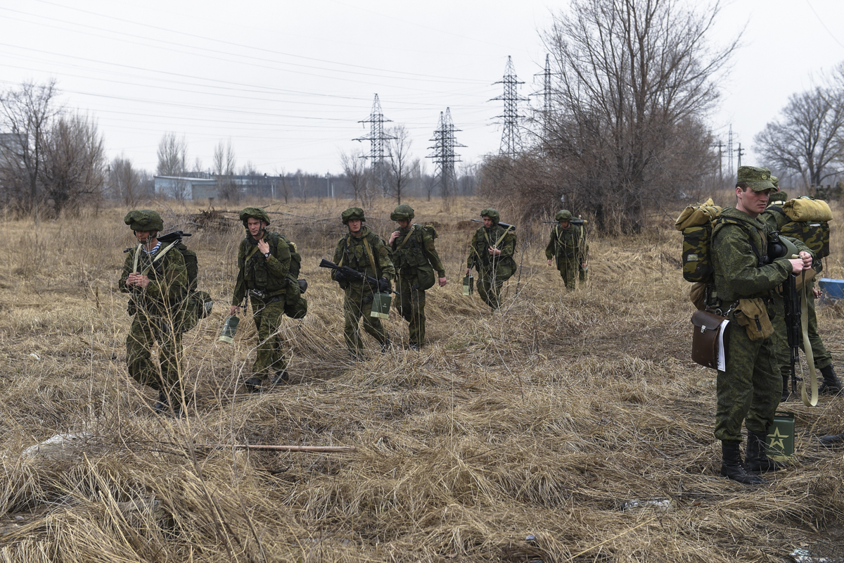 31-я отдельная гвардейская десантно-штурмовая бригада поднята по тревоге в рамках контрольной проверки ВДВ.